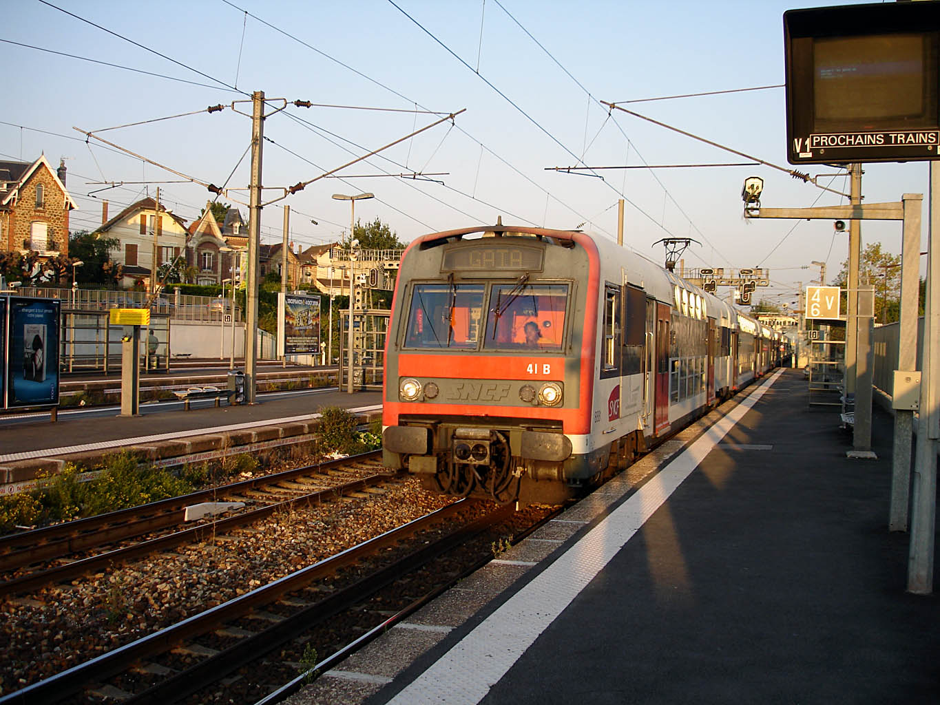 Z 8800 en gare d'Ermont - Eaubonne (Val-d'Oise)